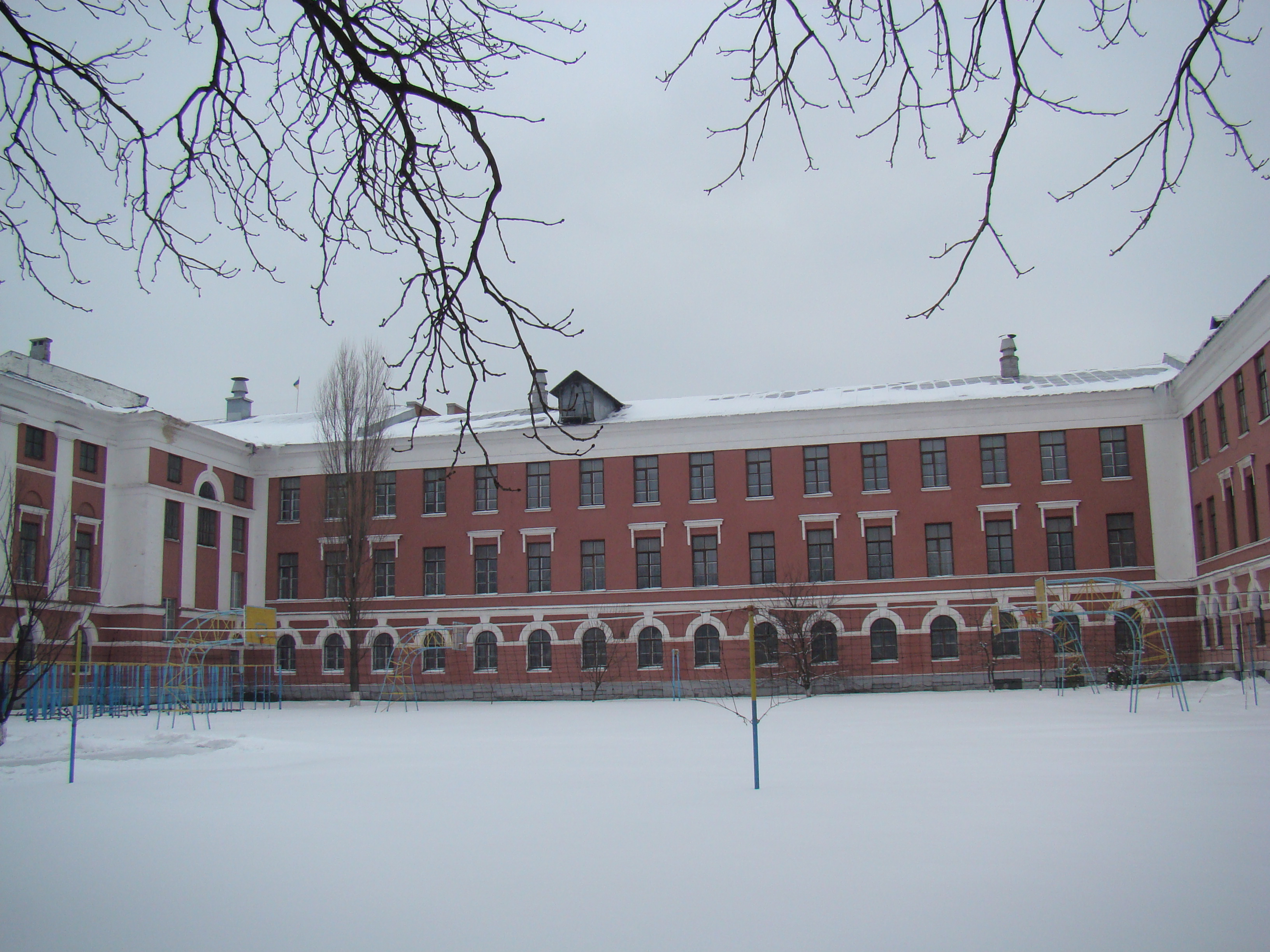 Корпус військової школи, Київ, Лесі Українки бульв., 25